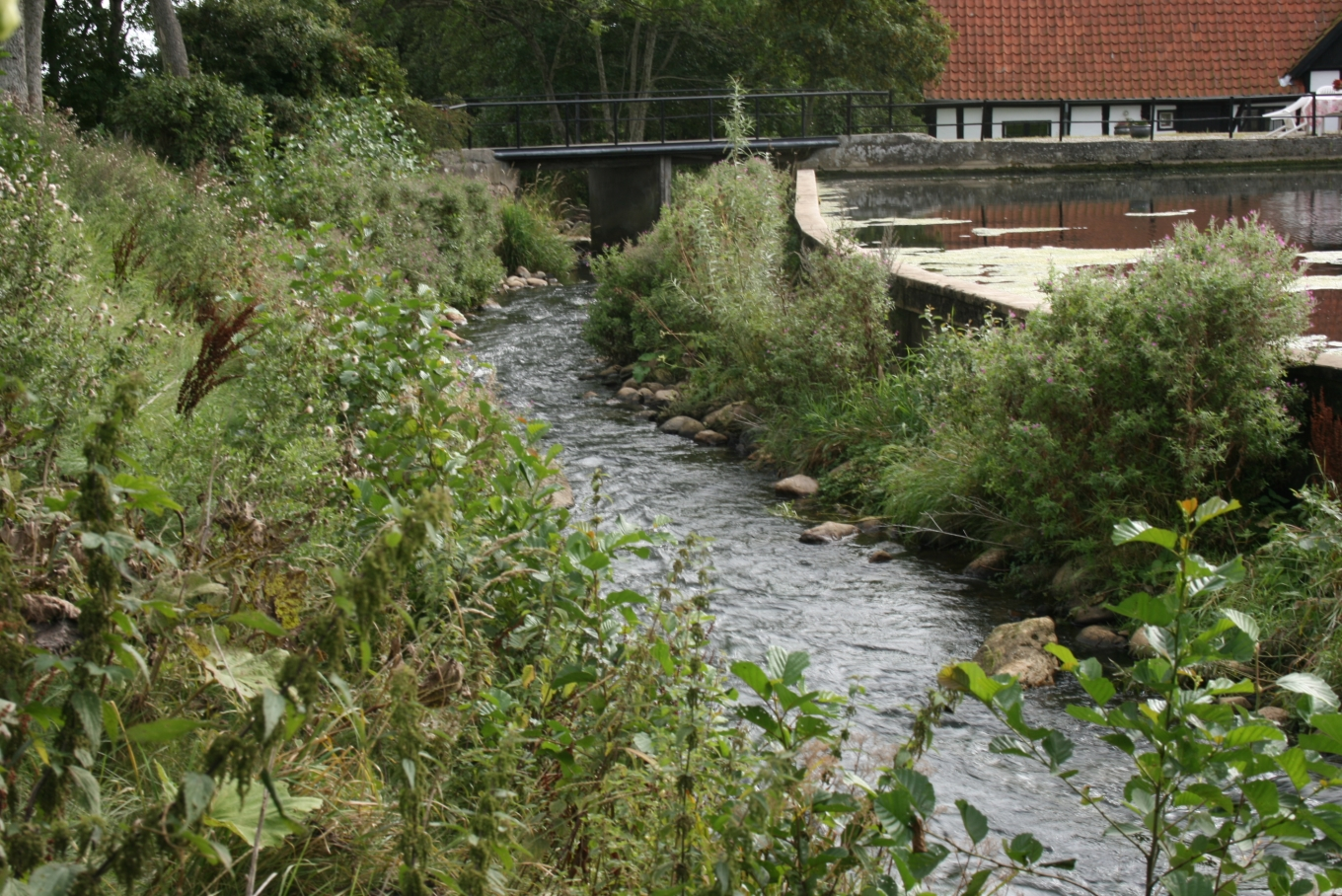 Århus Å ved Harlev Mølle.